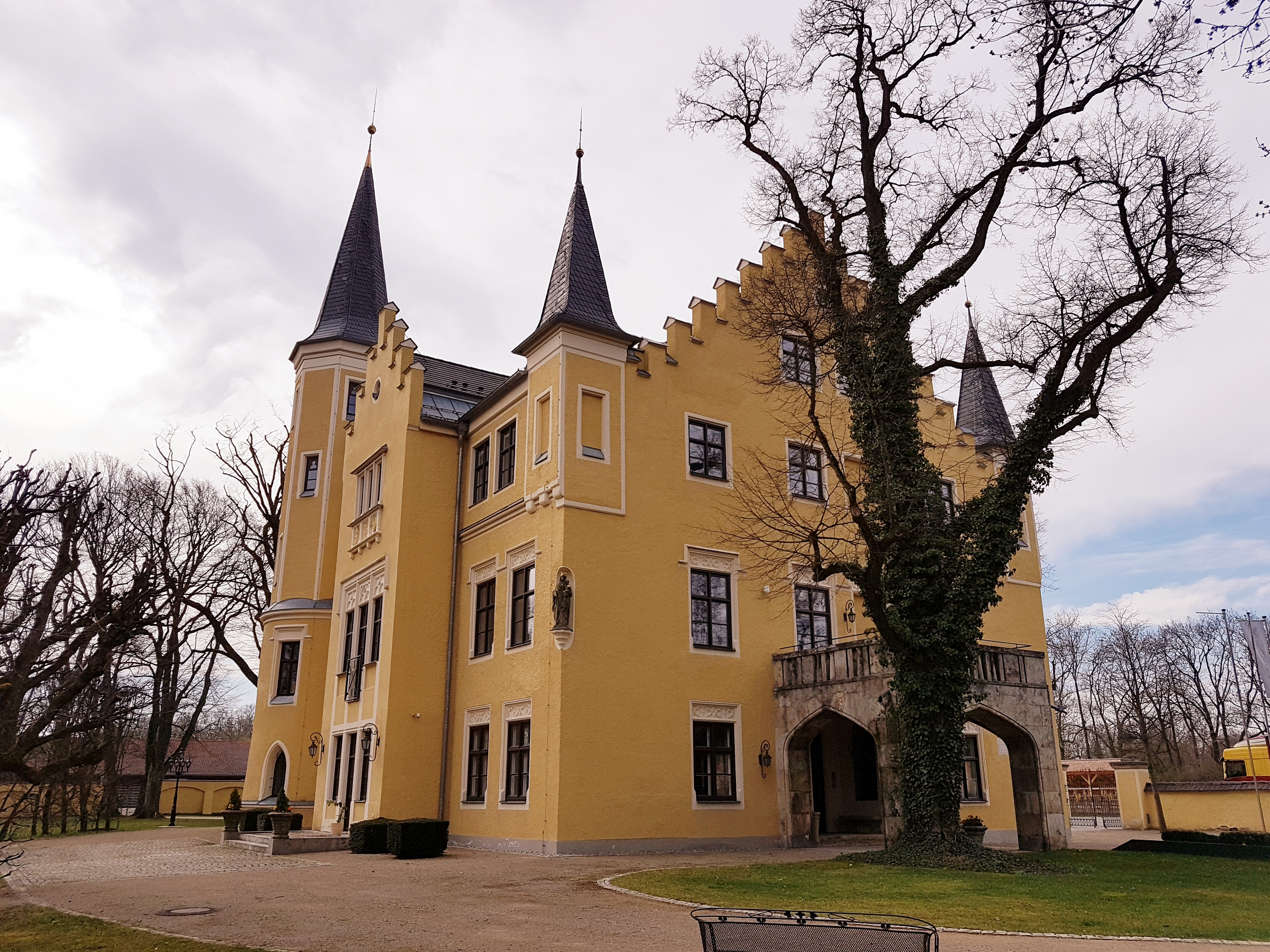 Schloss Freiham